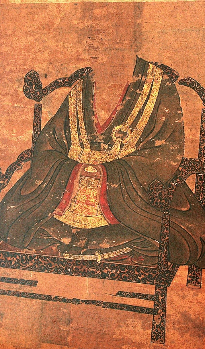 本佐倉城主・千葉勝胤とされる肖像画。